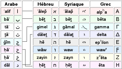 Tableau comparant divers alphabets d'origine sémitique.